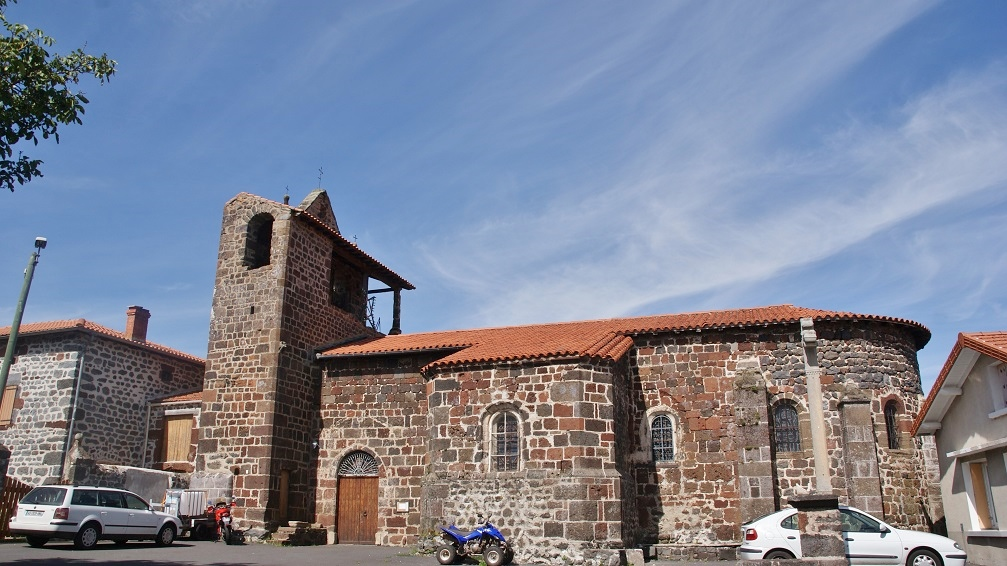 Église Sainte-Anne de Séneujols (43).